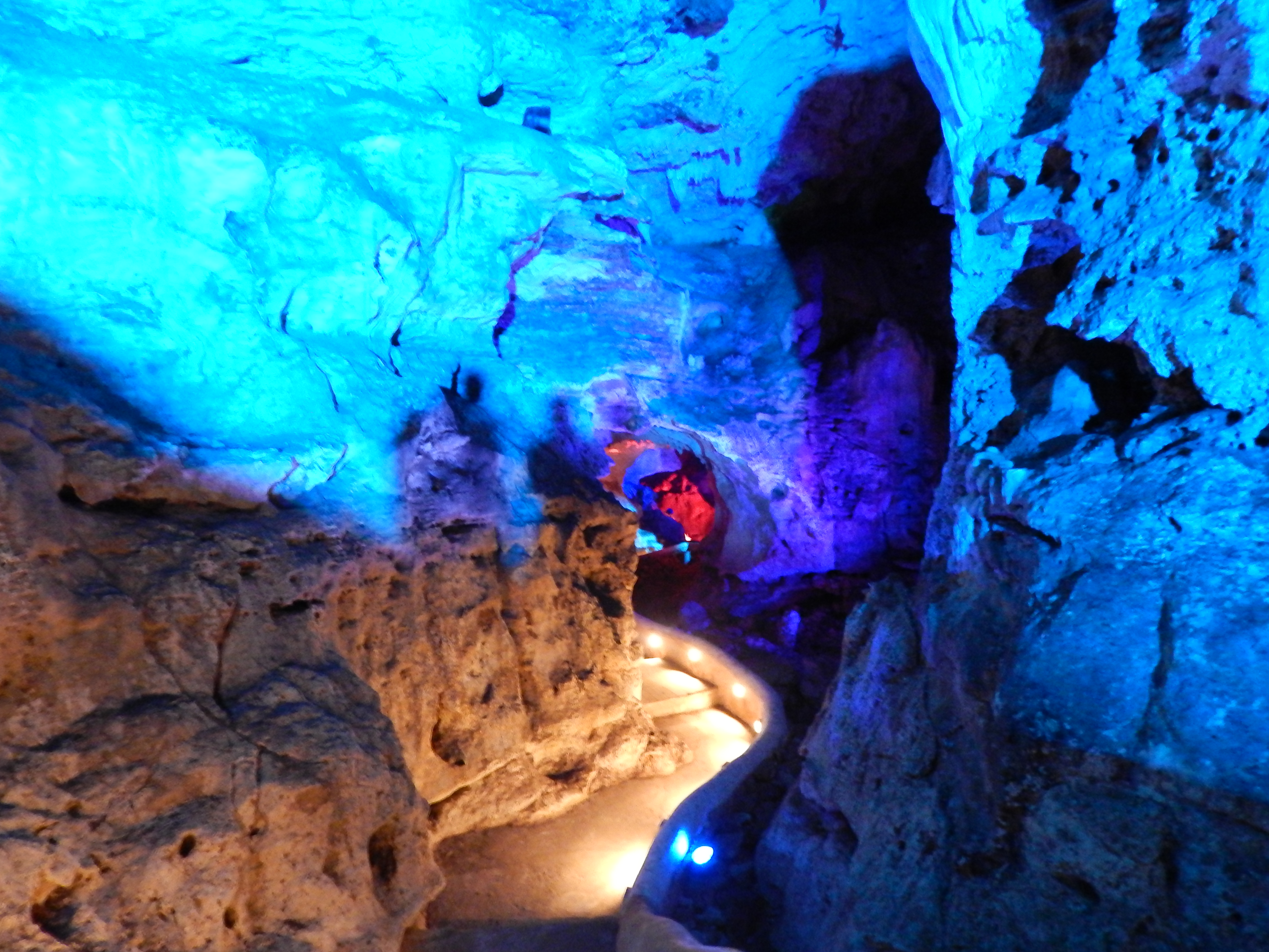 Vista de la gruta y de las formaciones de estalacticas.